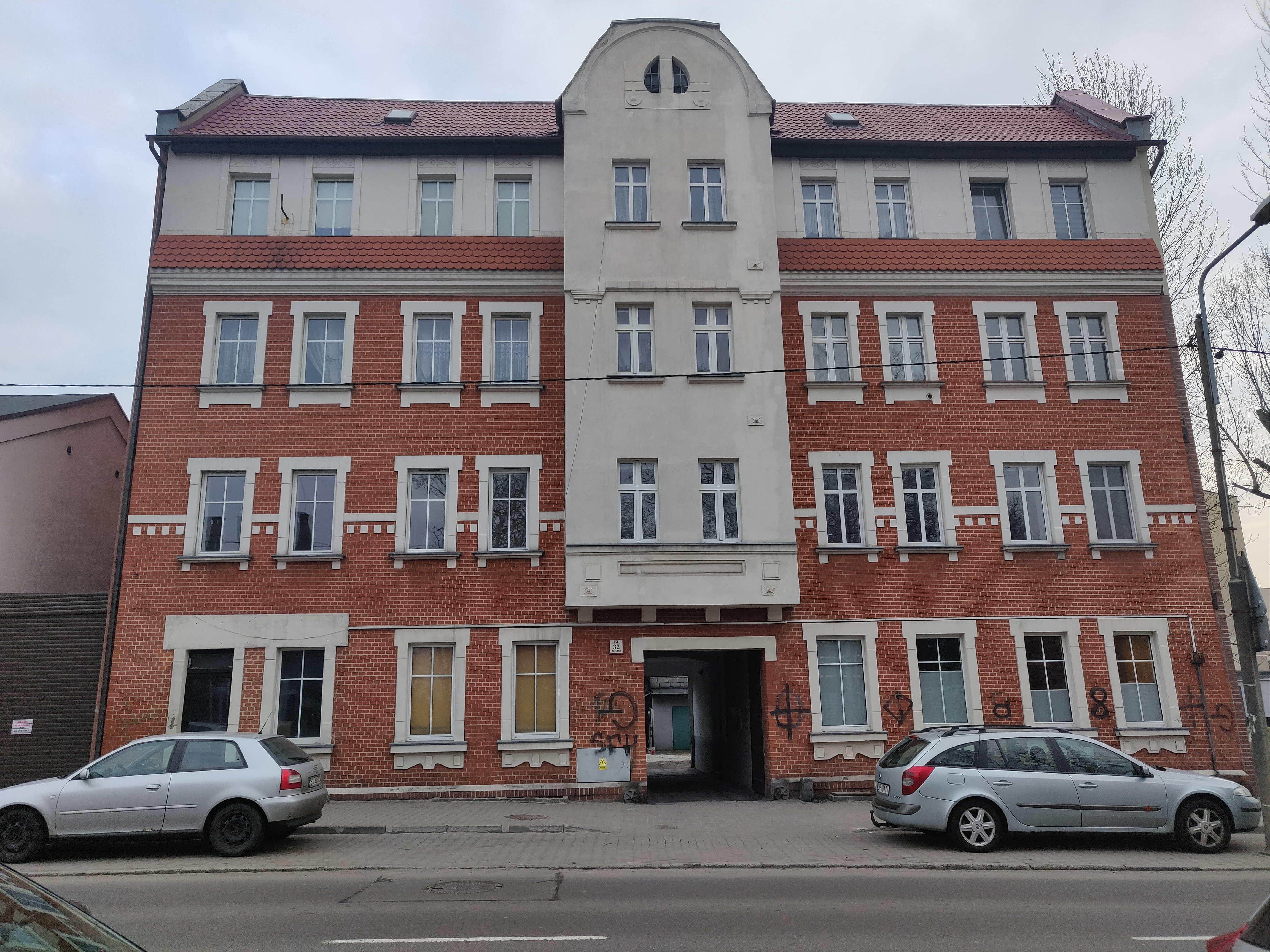 Kamienica przy ul. gen. Józefa Hallera 32